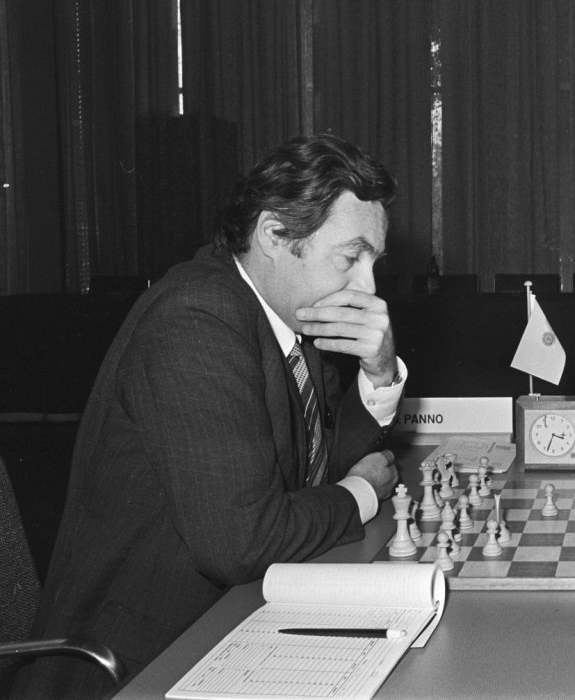 IBM-schaaktoernooi in Amsterdam 1977; Oscar Panno